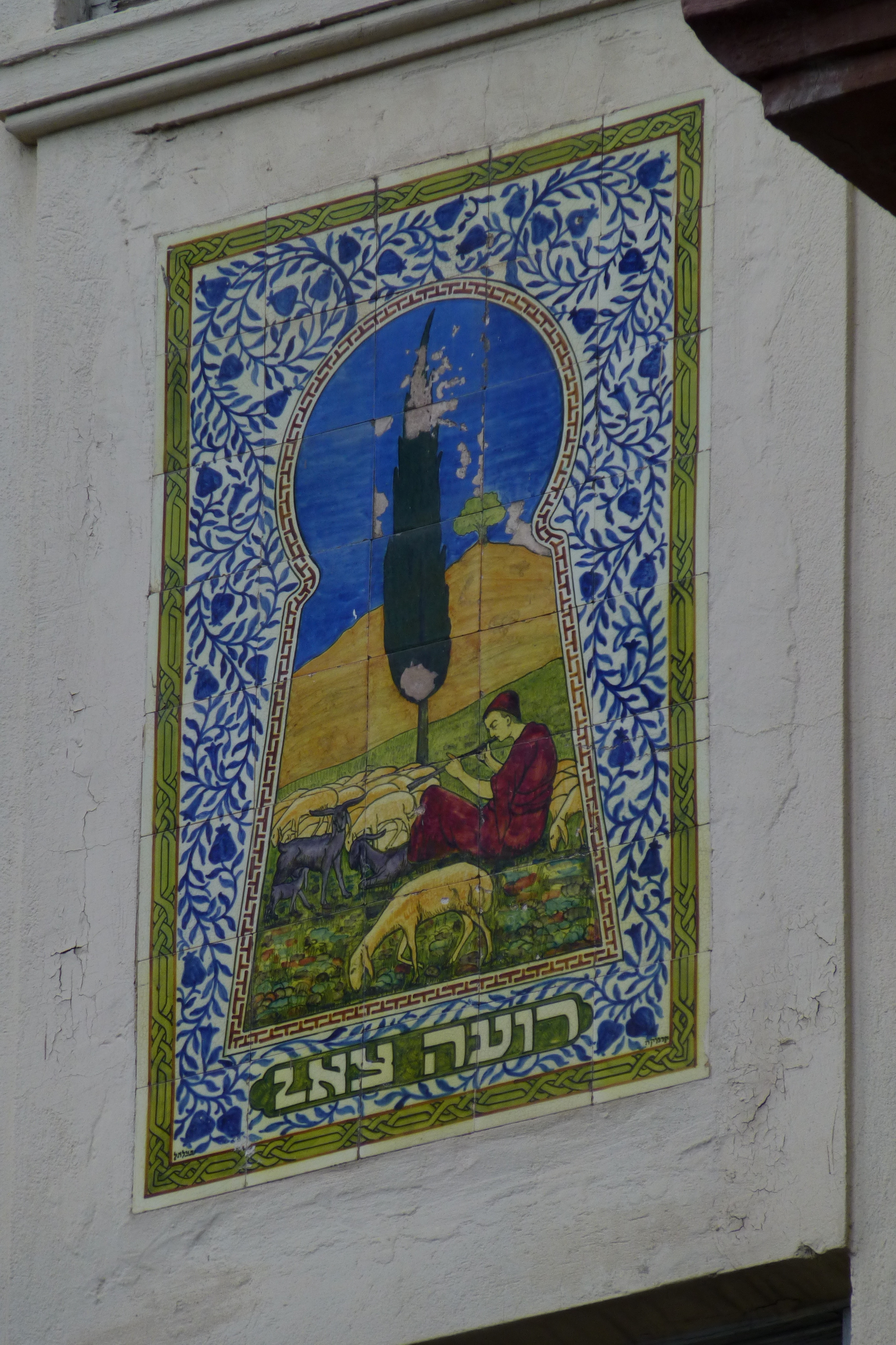 בית בשדרות רוטשילד פינת אלנבי בתל אביב. תוכנן על ידי האדריכל יוסף ברלין בשנת 1922. הסגנון העיצובי אקלקטי. המעקות מעוצבים כחנוכייה, ואת החלונות מעטרים עמודים קורינתיים. על החזיתות משובצים אריחי קרמיקה צבעוניים האריחים מציגים נופים מארץ ישראל וסיפורים מן התנ"ך. בחזית הפונה לאלנבי – ציור העיר ירושלים, וכן ציון שם בעלי הבית.